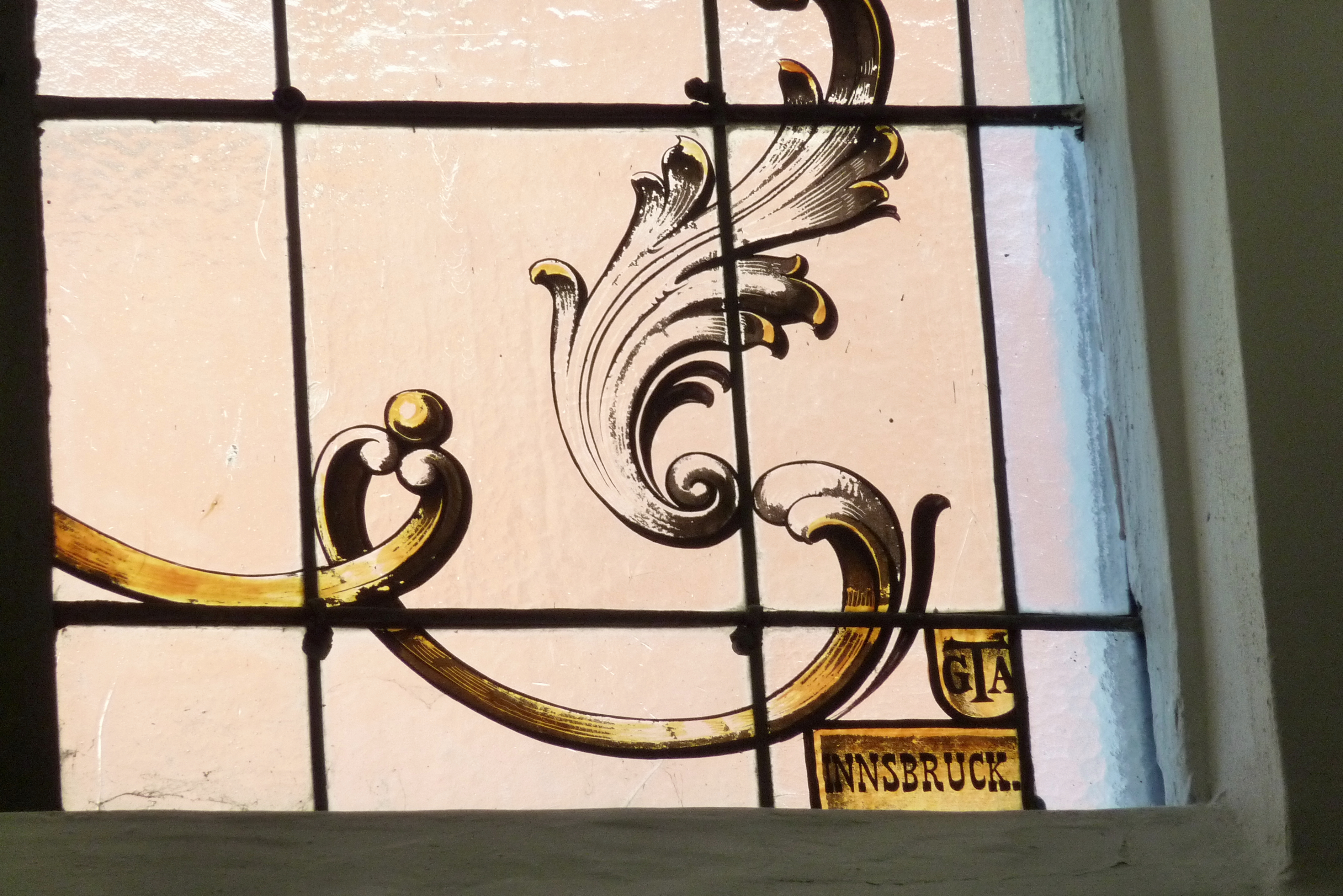 Katholische Pfarrkirche St. Johannes Baptist in Dischingen (Landkreis Heidenheim/Baden-Württemberg), Bleiglasfenster von 1903, Signatur: GTA Innsbruck